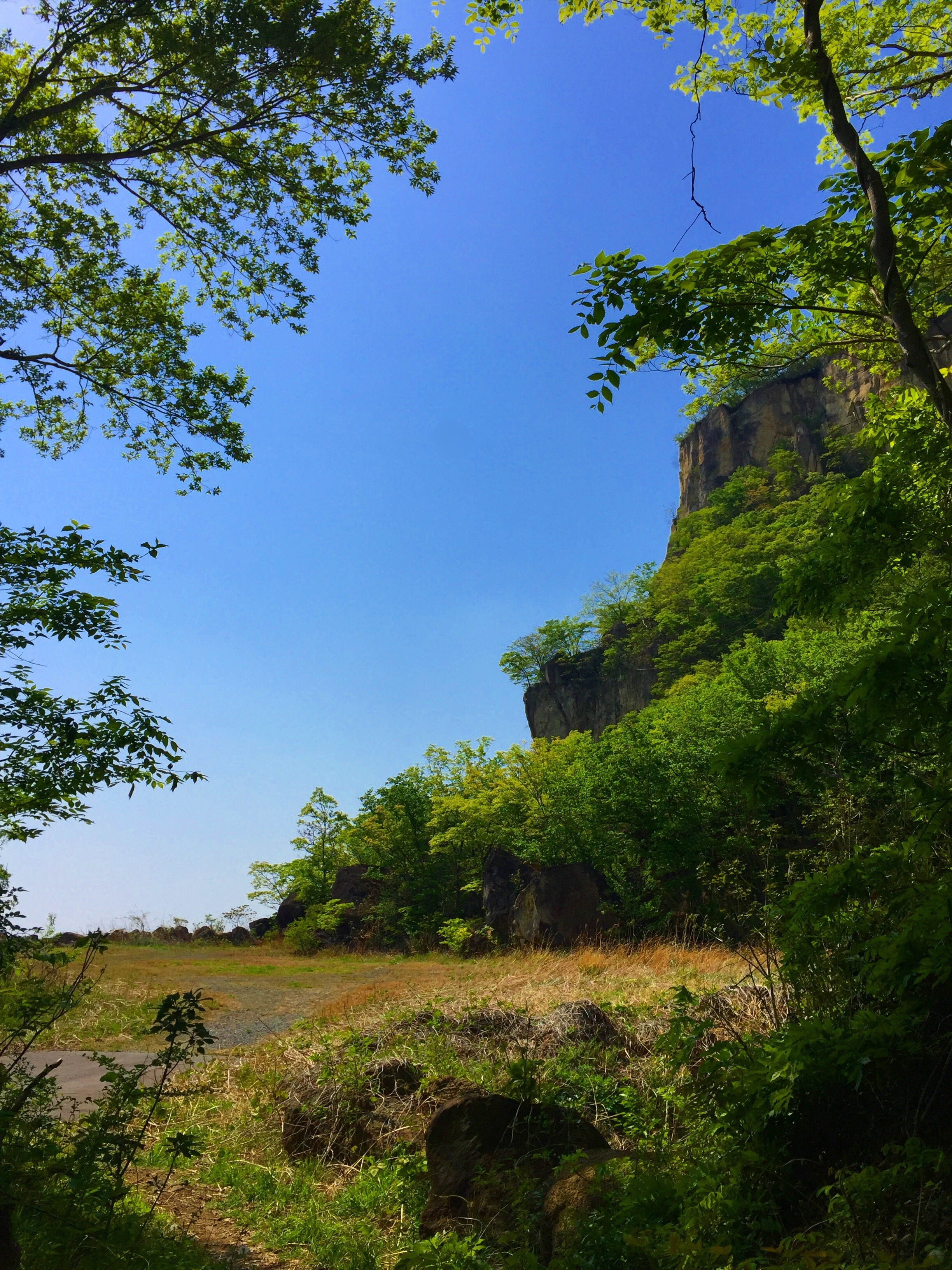 栃木県栃木市の岩船山中腹採石場跡。参道の途中、東の方角から写したもの。